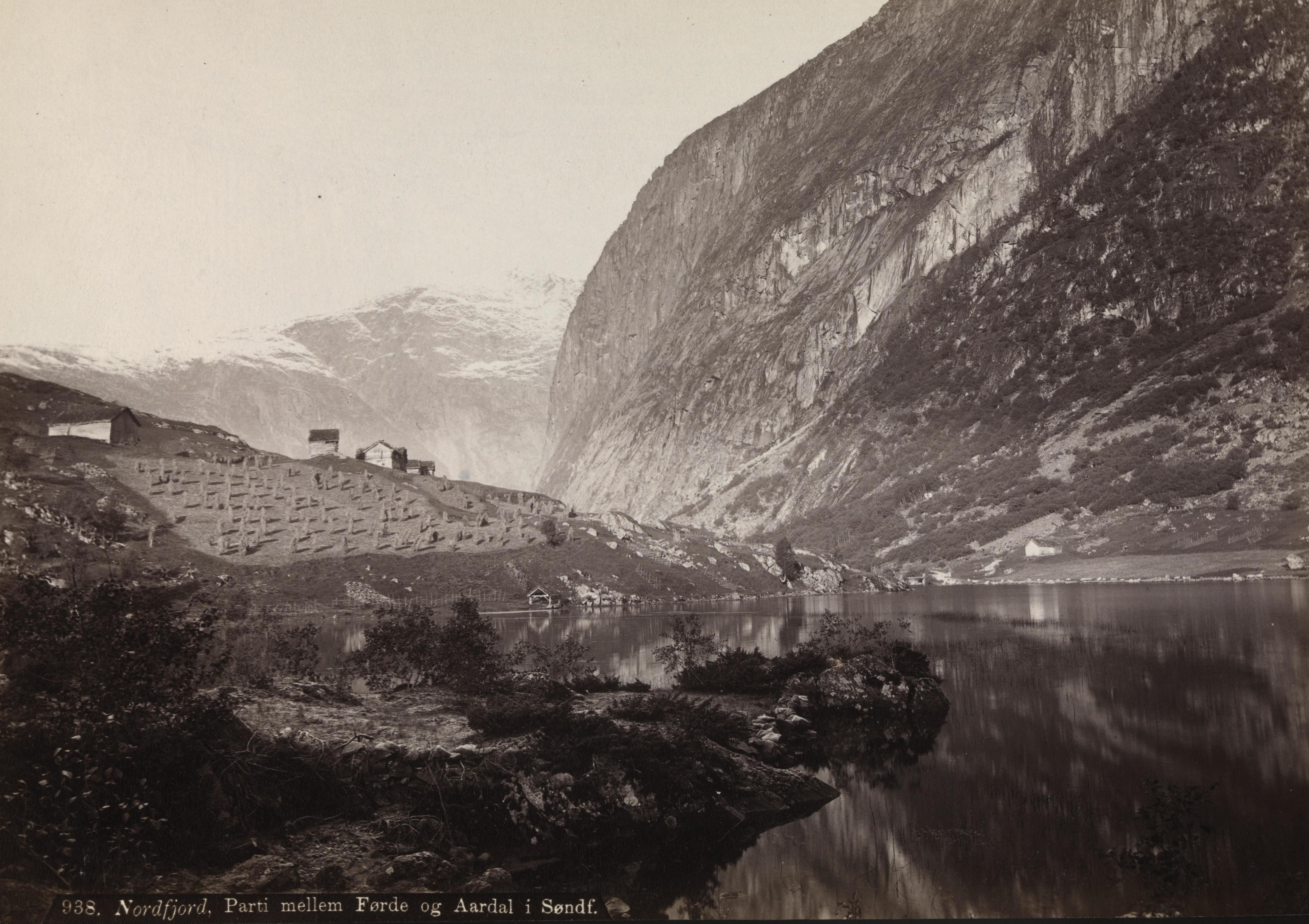 Bildet er hentet fra Nasjonalbibliotekets bildesamling. Anmerkninger til bildet var: Ekstern kommentar: Dette biletet er frå Paulen, på vegen mellom Grungen i Jølster og Førde som før heitte Førde i Breim (Førs på dialekt) men nå er under Jølster kommune. Garden opp til venstre er den garden, Paulen, der felespelarane Moses, Adolf og Magnus Paulen kom frå. Vatnet heiter Paulsvatnet. Det bratte fjellet til høgre i bakgrunnen ligg rett opp for Førde-gardane Paulen, Jølster, Sogn og Fjordane